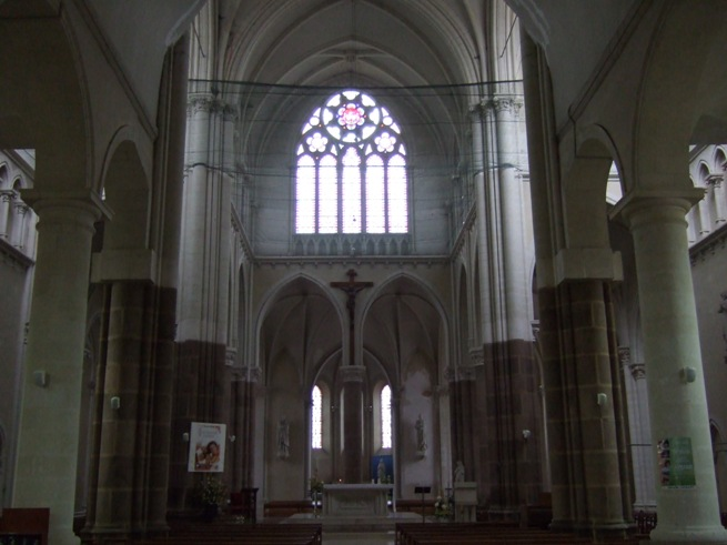 Intérieur de l'église de Gesté